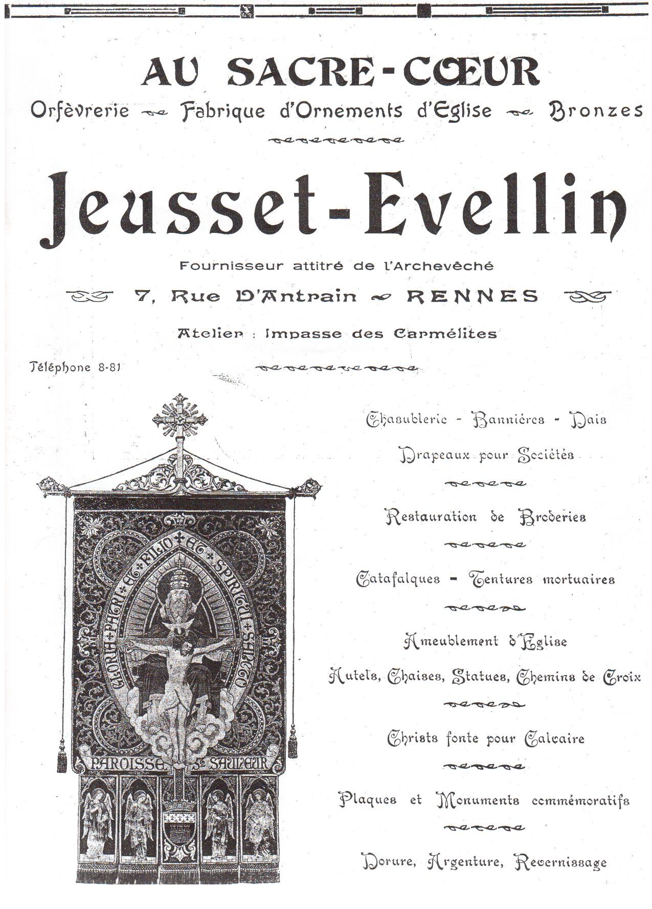 Publicité non datée pour la maison Jeusset-Evellin (probablement années 1920-1930)